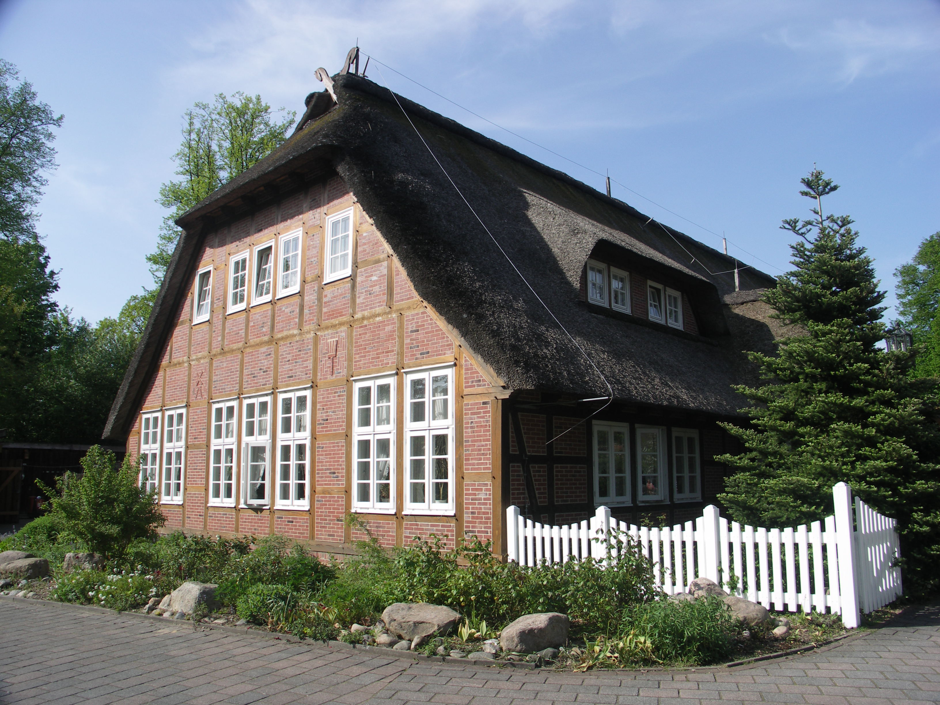 Inselhaus im Freilichtmuseum auf der Insel in Stade